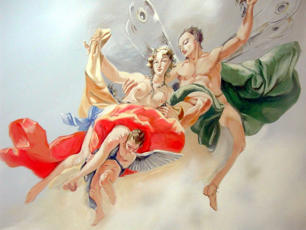 Stropná maľba v kupole Licensing Autorom fotografie je Imrich Šimonek z Dubníka Kategória:Presunúť_na_Commons